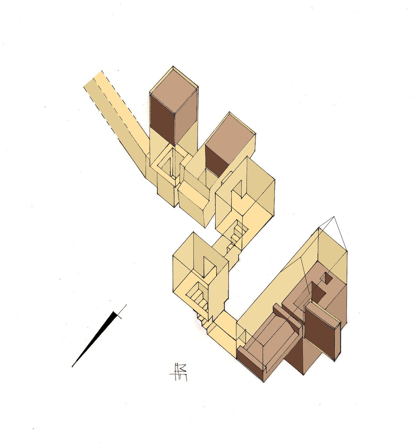 Vue axonométrique des appartements funéraires de la pyramide d'Ameni kemaou à Dahchour (pas à l'échelle)